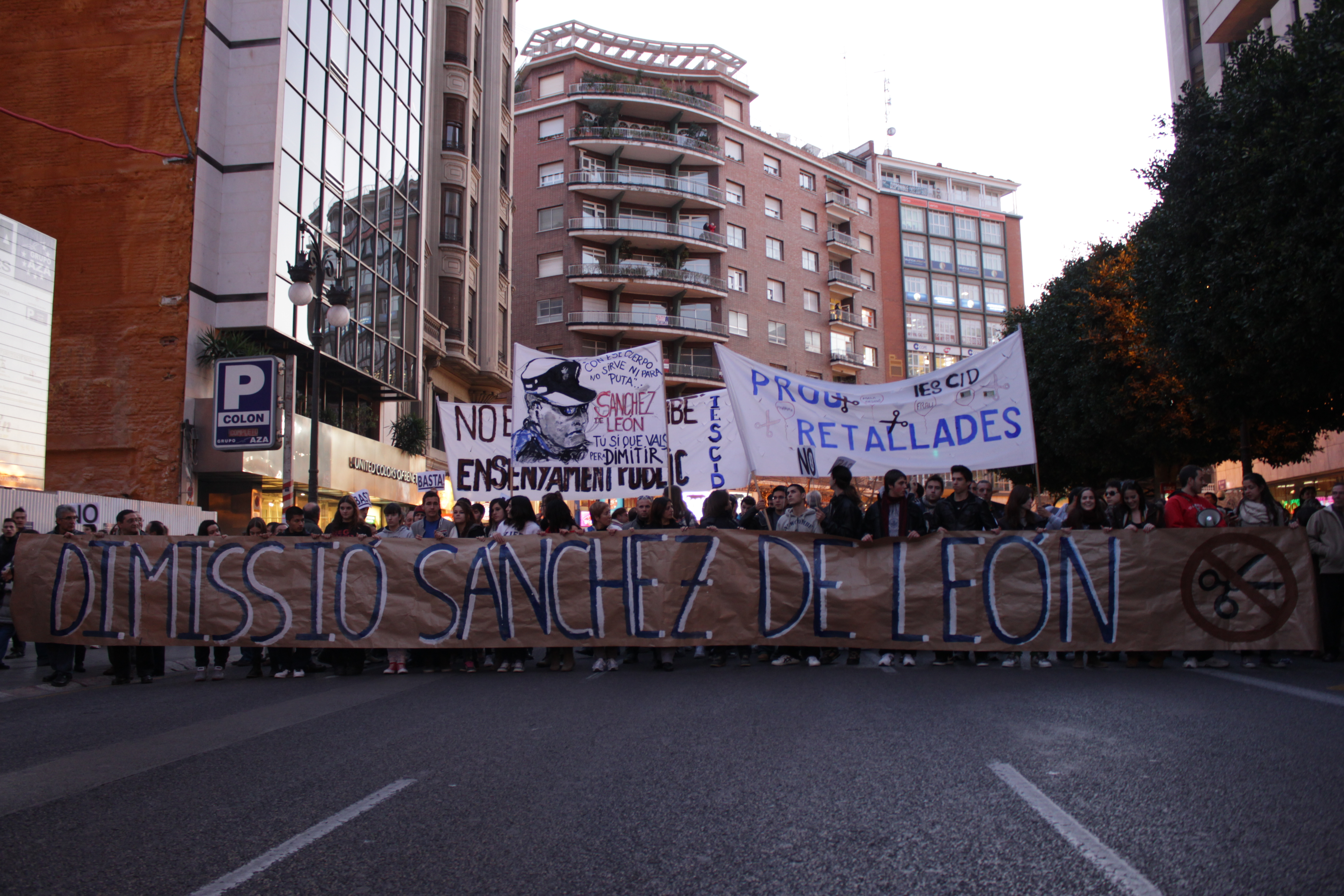 Manifestació "Som el Poble, no l'enemic" al centre de València. Els manifestants demanen la dimissió de Sánchez de León